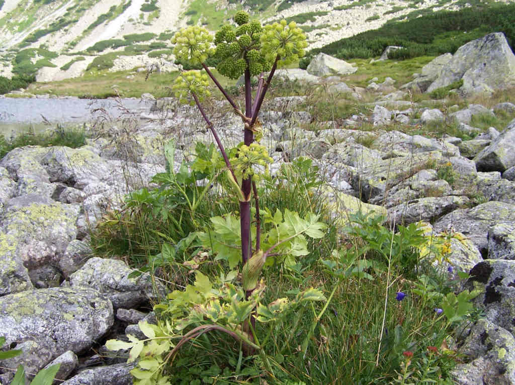 Angelica archangelica (pl. dzięgiel litwor), habitat: Tatra Mountains, Dolina 5 Stawów Polskich